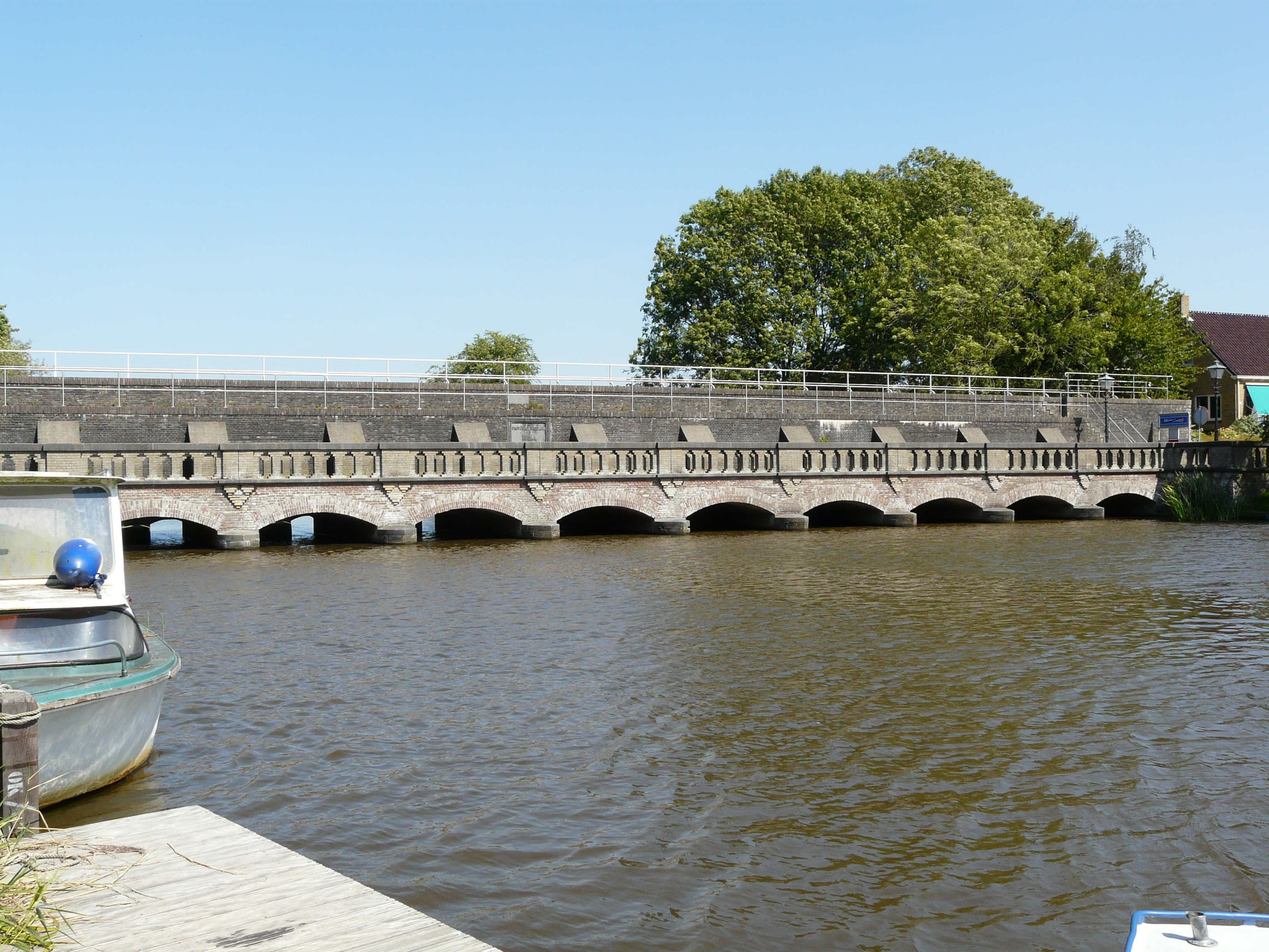 Sluis in de Lauwers